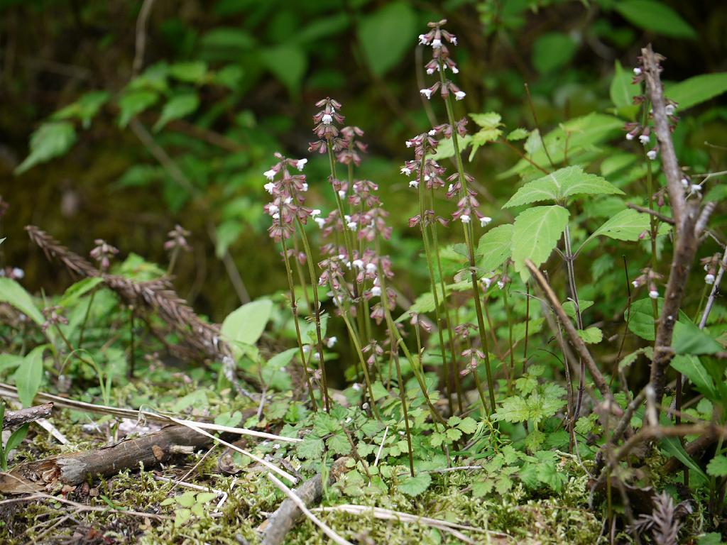 Salvia ranzaniana：ハルノタムラソウ 2010/05/15 和歌山県田辺市：Tanabe City. Wakayama Pref. Japan